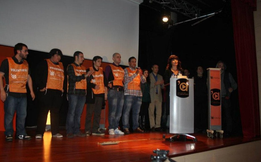 Actu presentación Iniciativa 2011